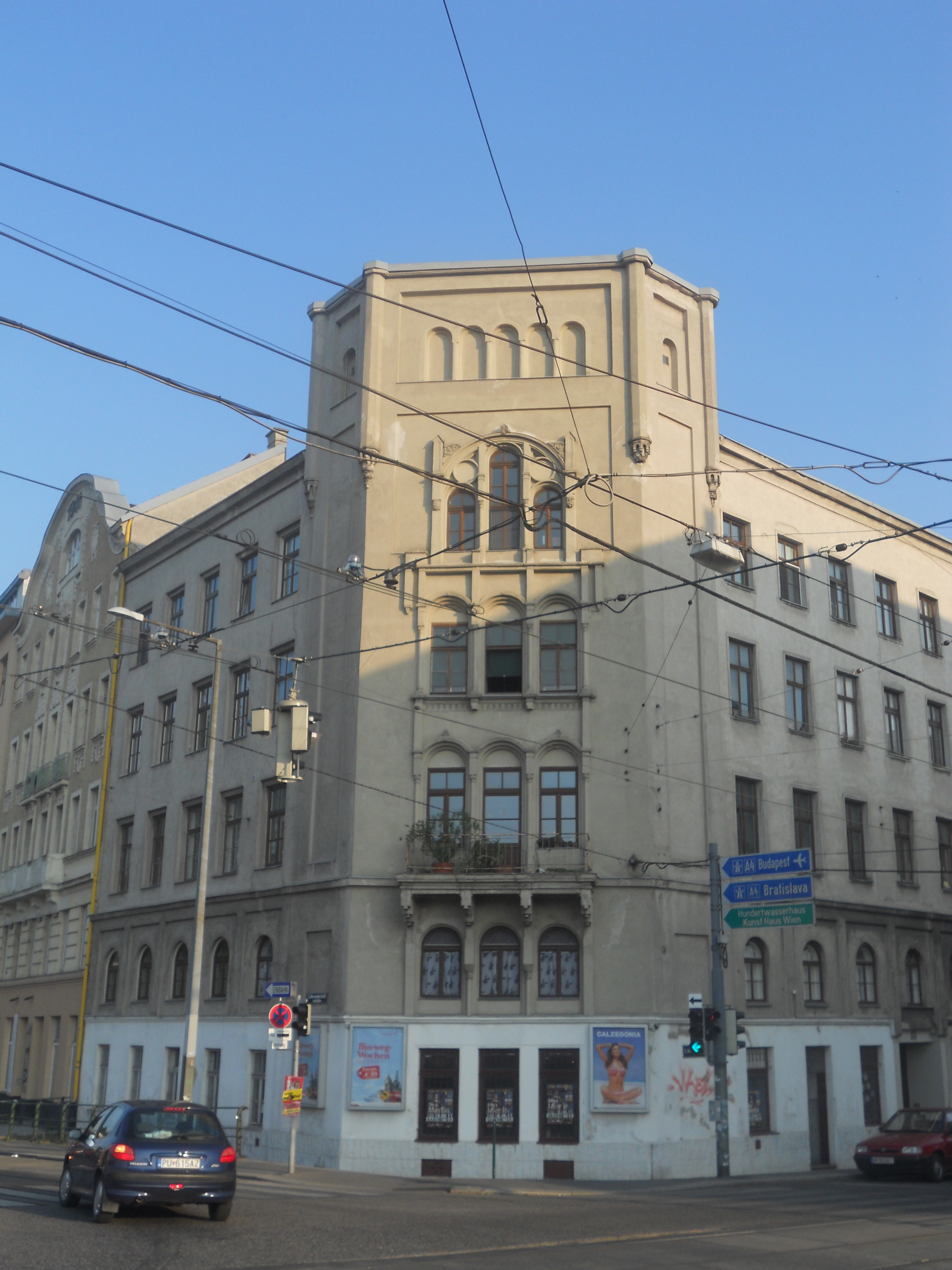 Haus Radetzkystraße 26 in Wien, 1847 von Josef Kastan erbaut.